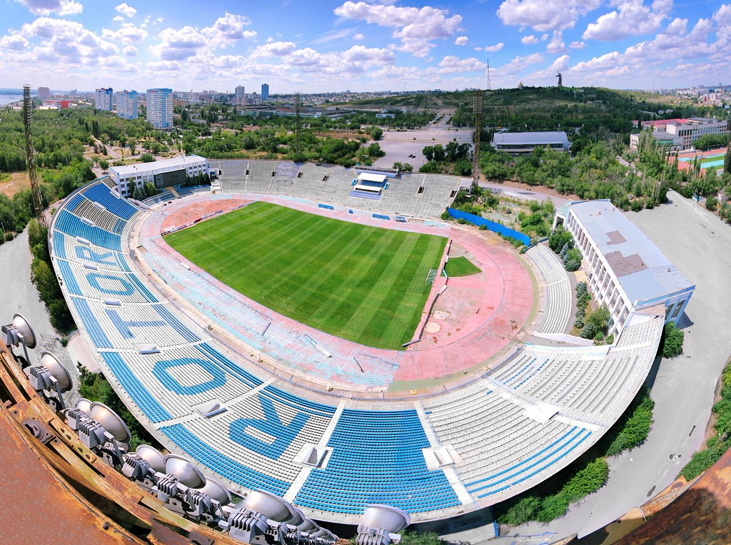 Центральный стадион с высоты птичьего полёта. Вид с осветительной мачты